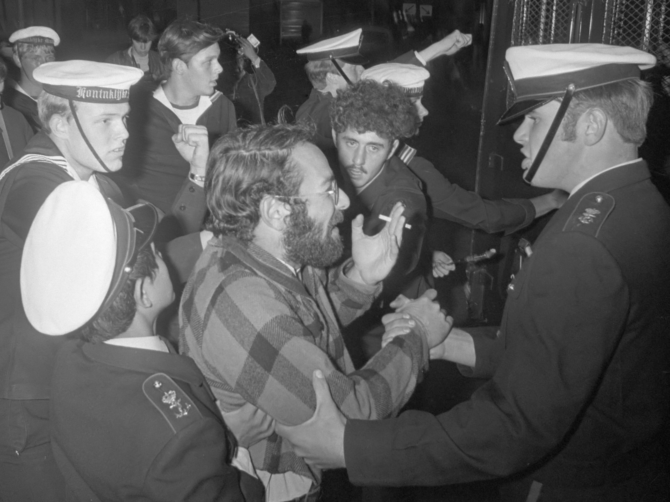 Mariniers verwijderen Damslapers bij Nationaal Monument Amsterdam; mariniers sturen man weg 25 augustus 1970